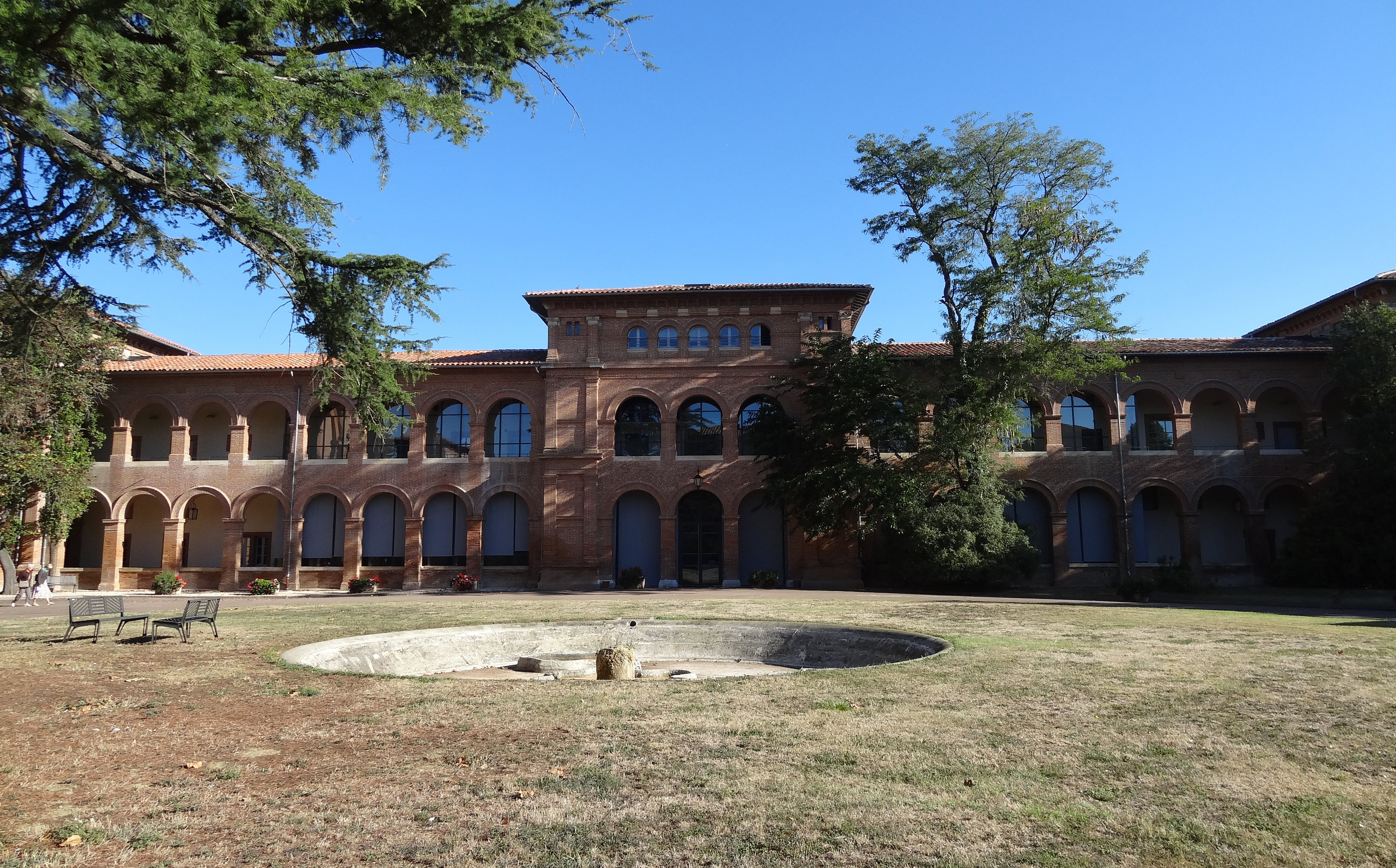 Centre hospitalier Gérard Marchant, à Toulouse, fortement endommagé par l'explosion de l'usine AZF en septembre 2001 .